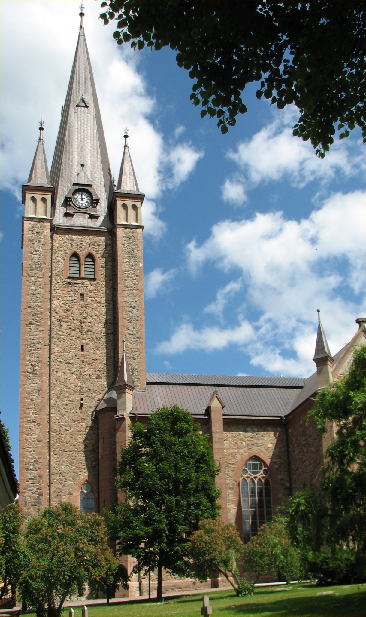 Torget i Mariestad